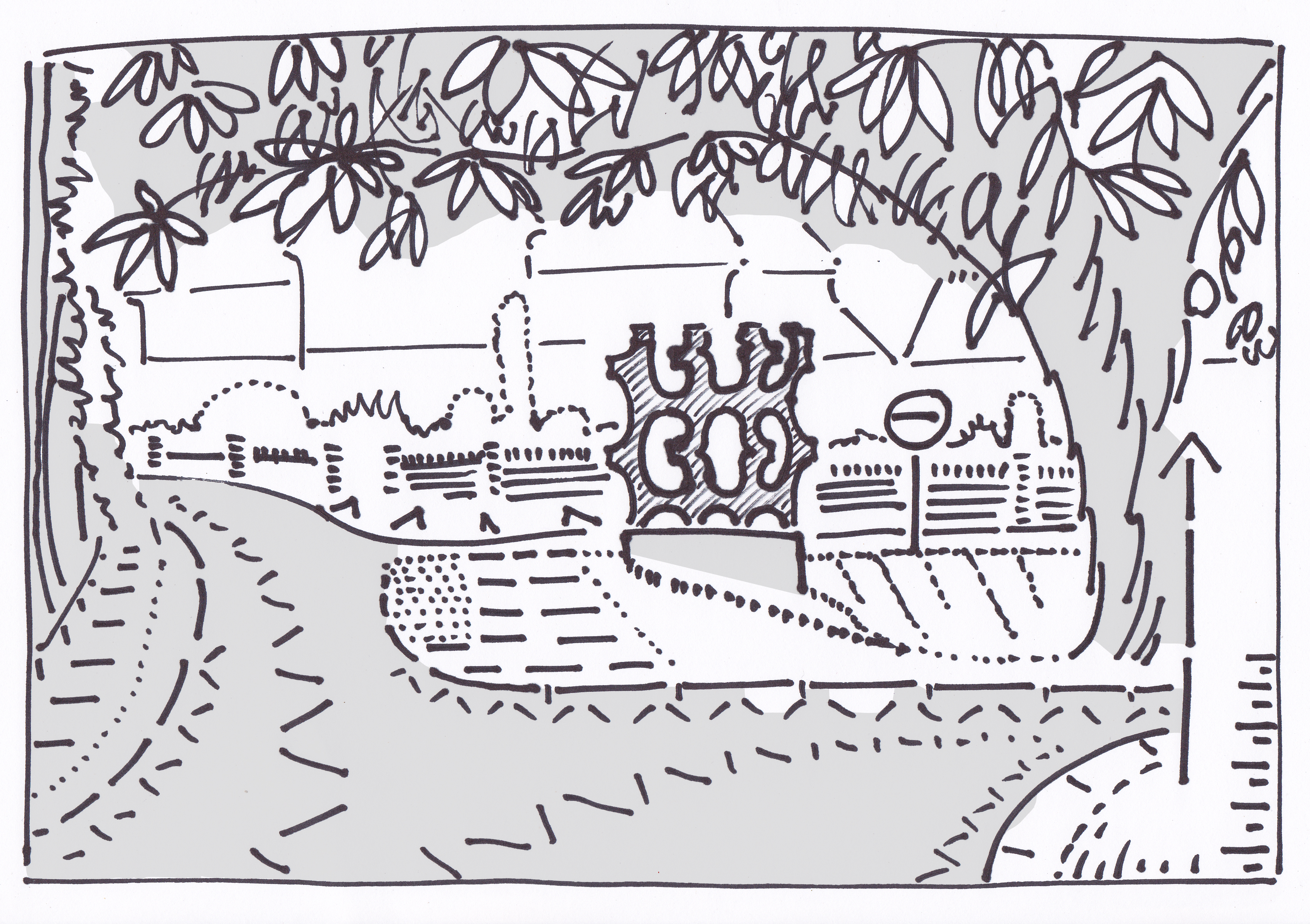 Tekening van een beeld van Rinus Roelofs bij de tuindorpvijver in Hengelo